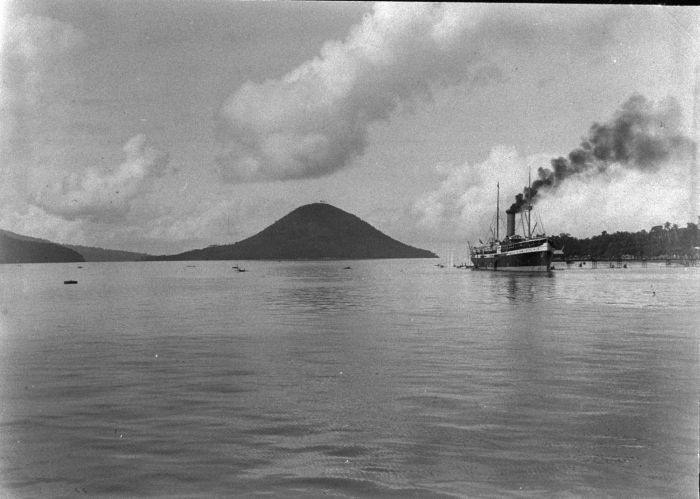 Foto. Foto is genomen tijdens de Wichmann Expeditie naar Noord Nieuw-Guinea. S.S. Van Goens langs een steiger, met op de achtergrond Poelau Maitara